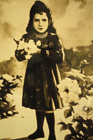 Menina Izildinha 04